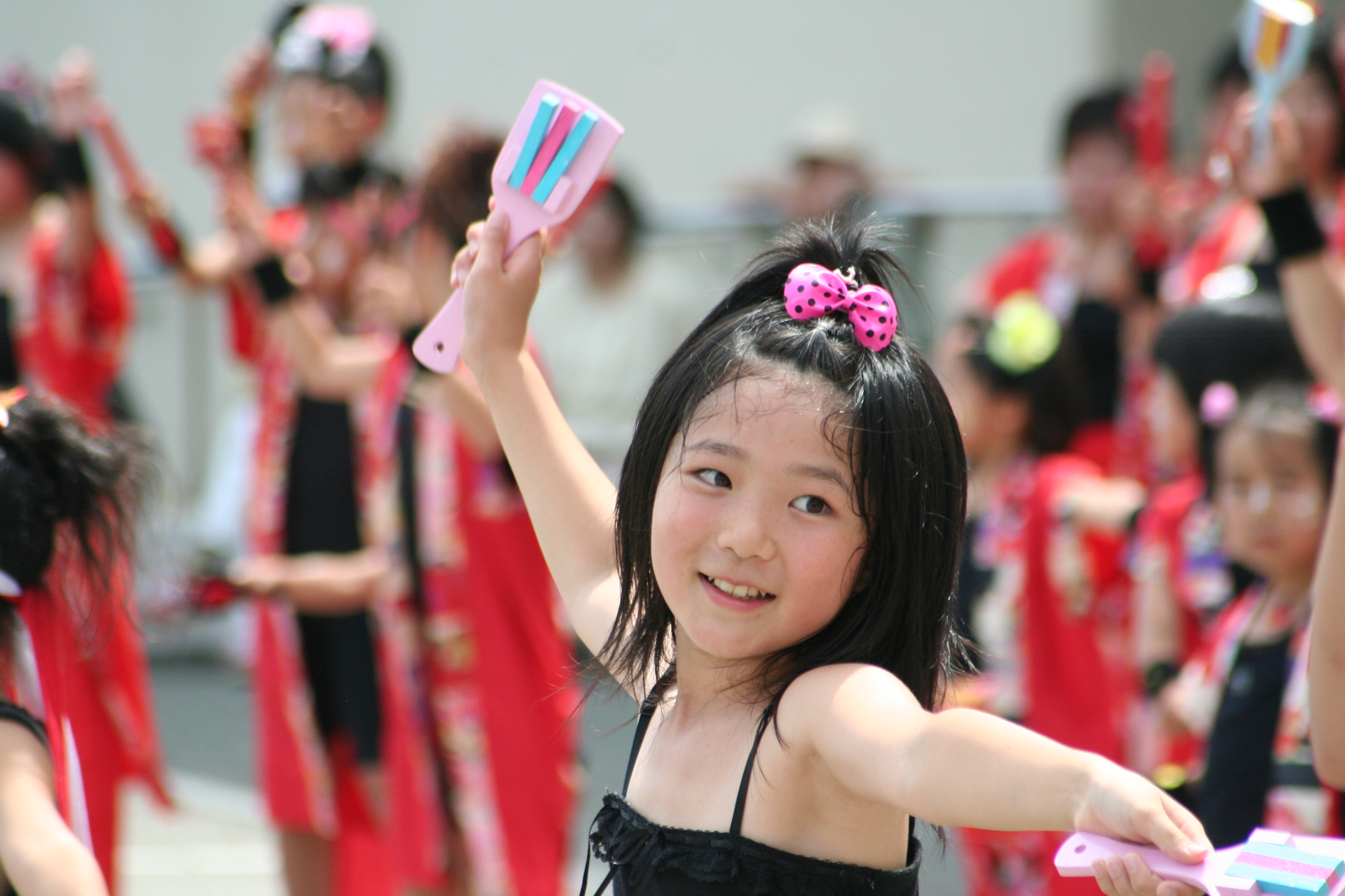 相生ペーロン祭。兵庫県相生市にて毎年開催される祭。2009年7月11･12日の2日間にかけて行なわれた祭の2日目の様子。